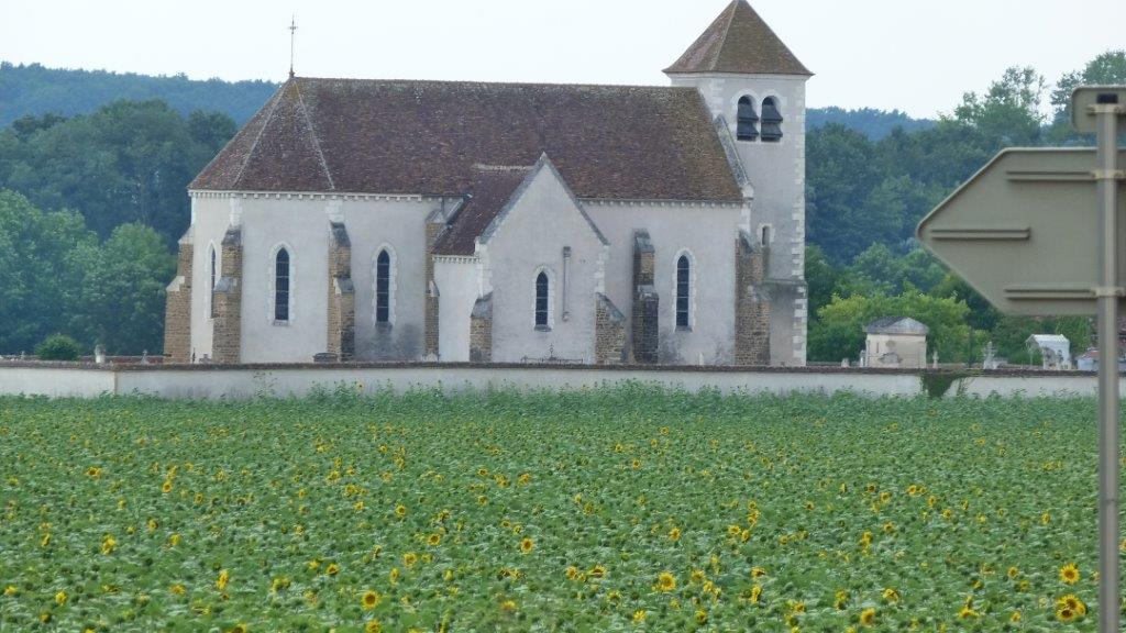 Preĝejo de Hauterive